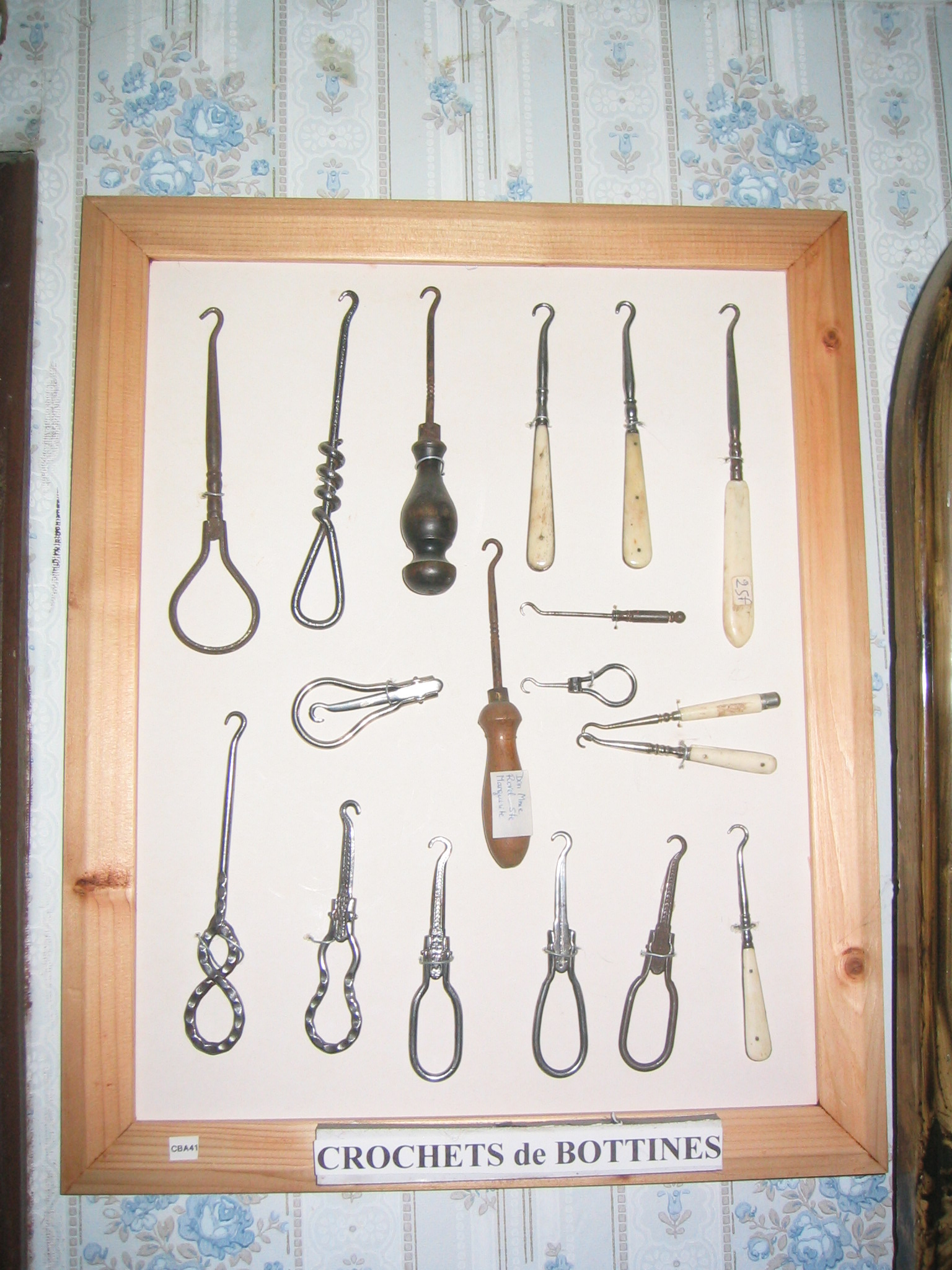 Crochets de bottines : accessoires de chaussage à la ferme-musée de la Soyotte (Saint-Dié-des-Vosges, France)